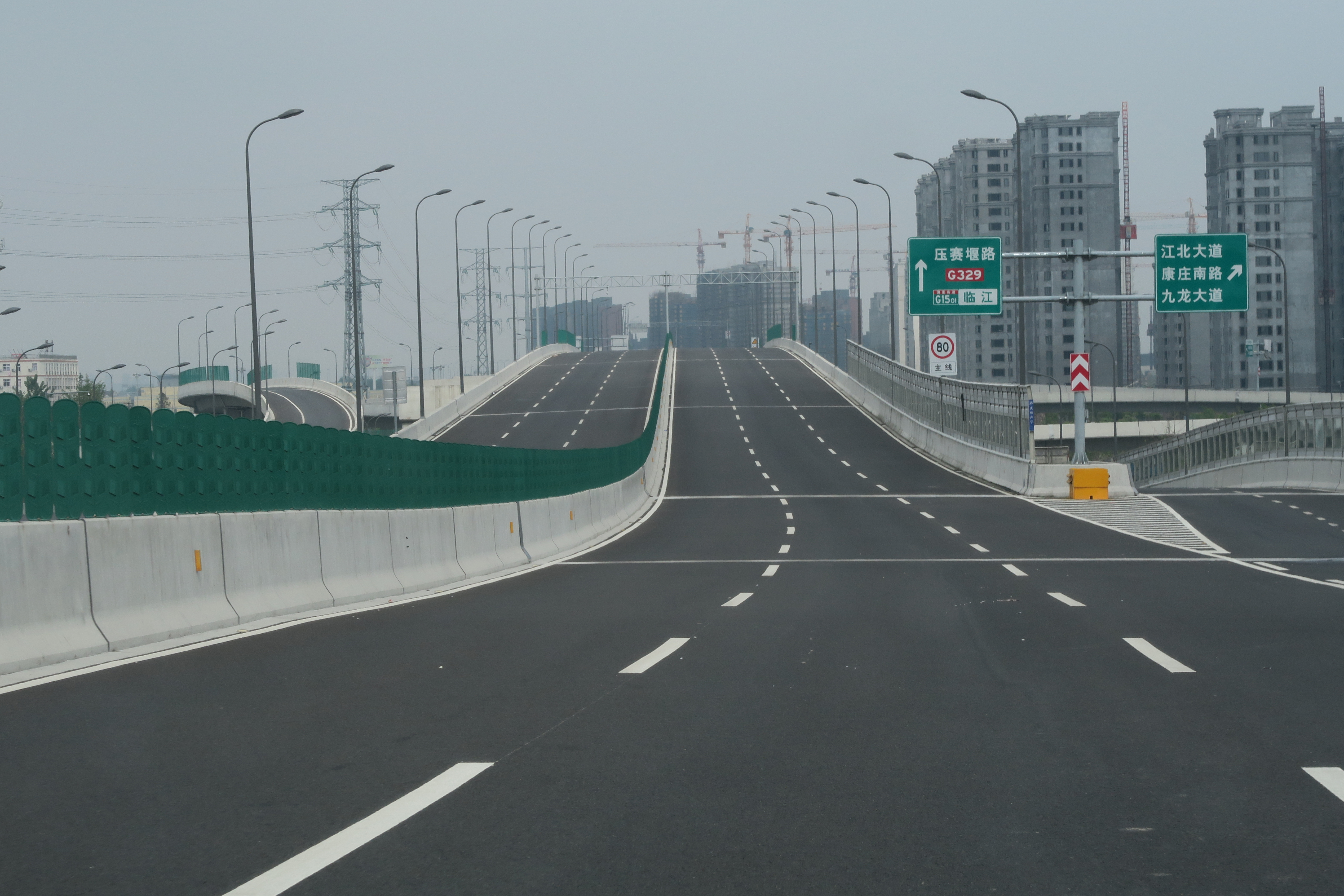 宁波北外环高架西段